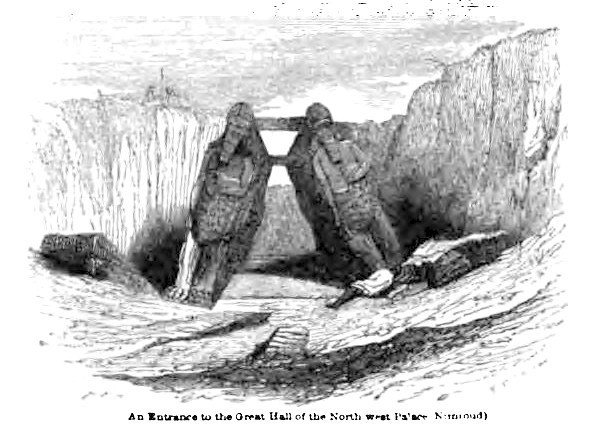 Nimrud-Ein Eingang zur Großen Halle des Nord-West-Palastes